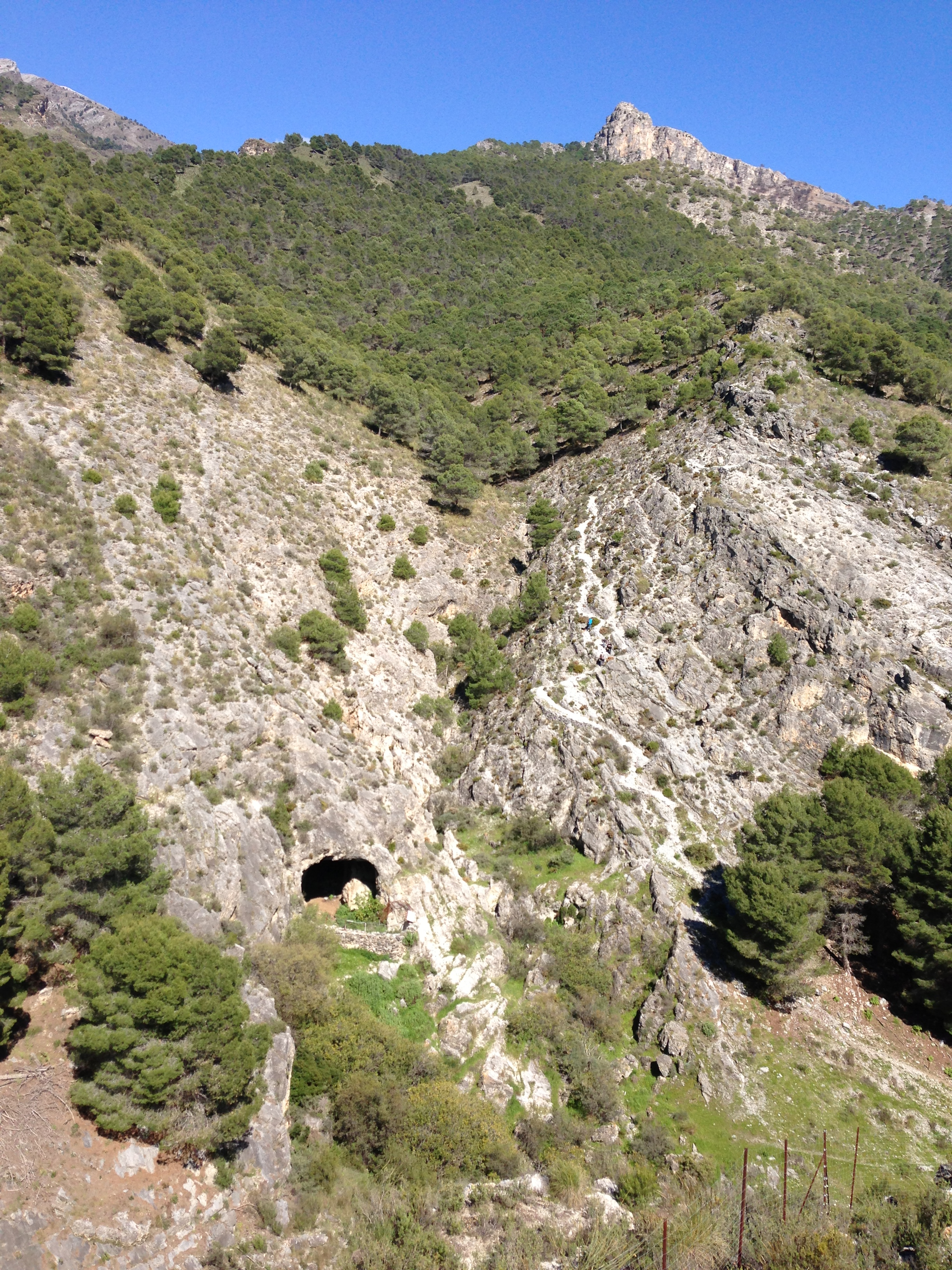 Sierra de Tejeda